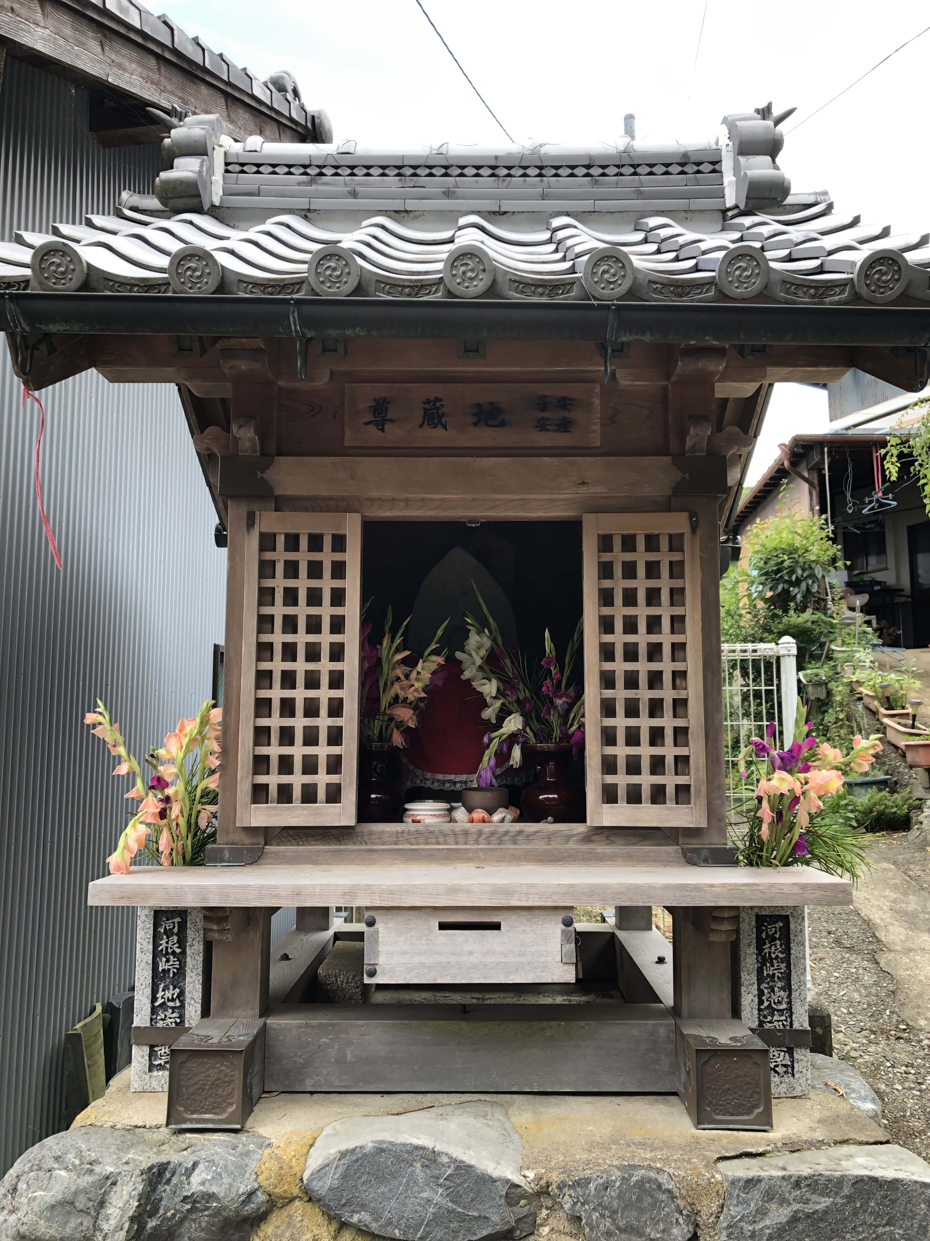 京大坂道第4の地蔵（河根峠）